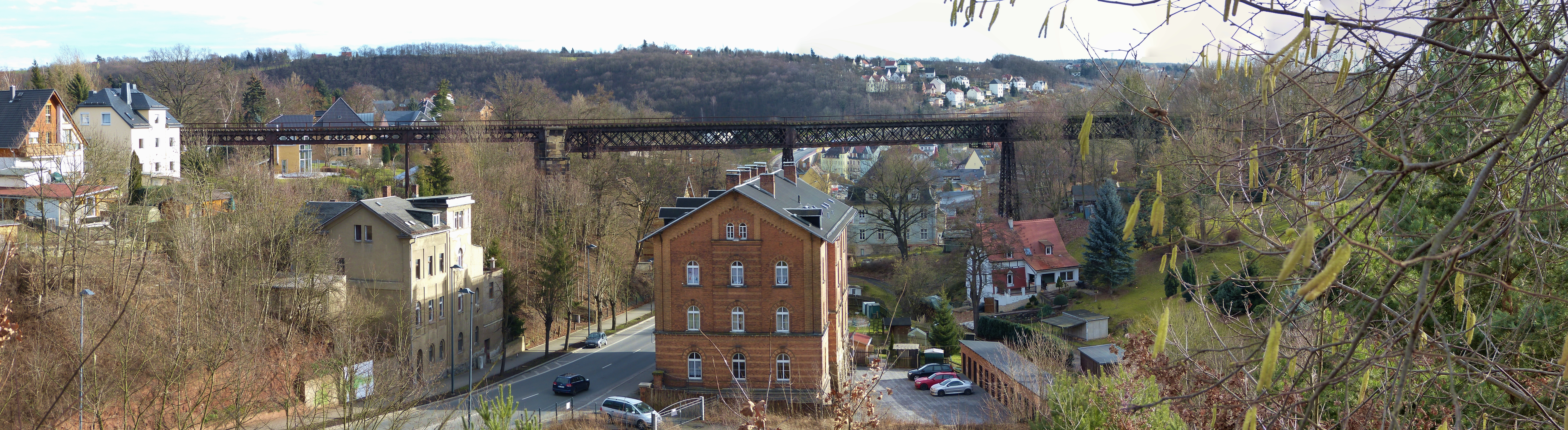 Das Oschütztal-Viadukt in Weida (Landkreis Greiz) wurde 1884 erbaut.